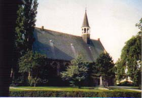 zelfgemaakte foto van de kerk in oudenhoorn